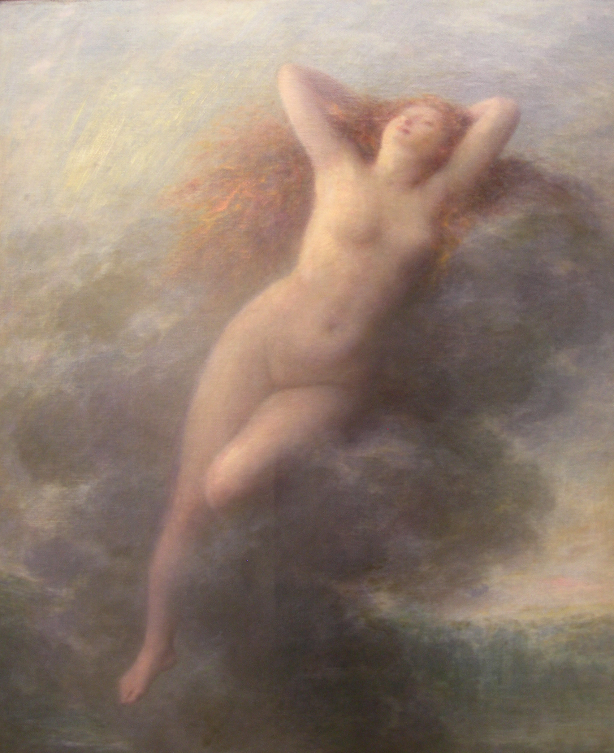 Le Matin, Musée d'Art et d'Industrie de Roubaix, France